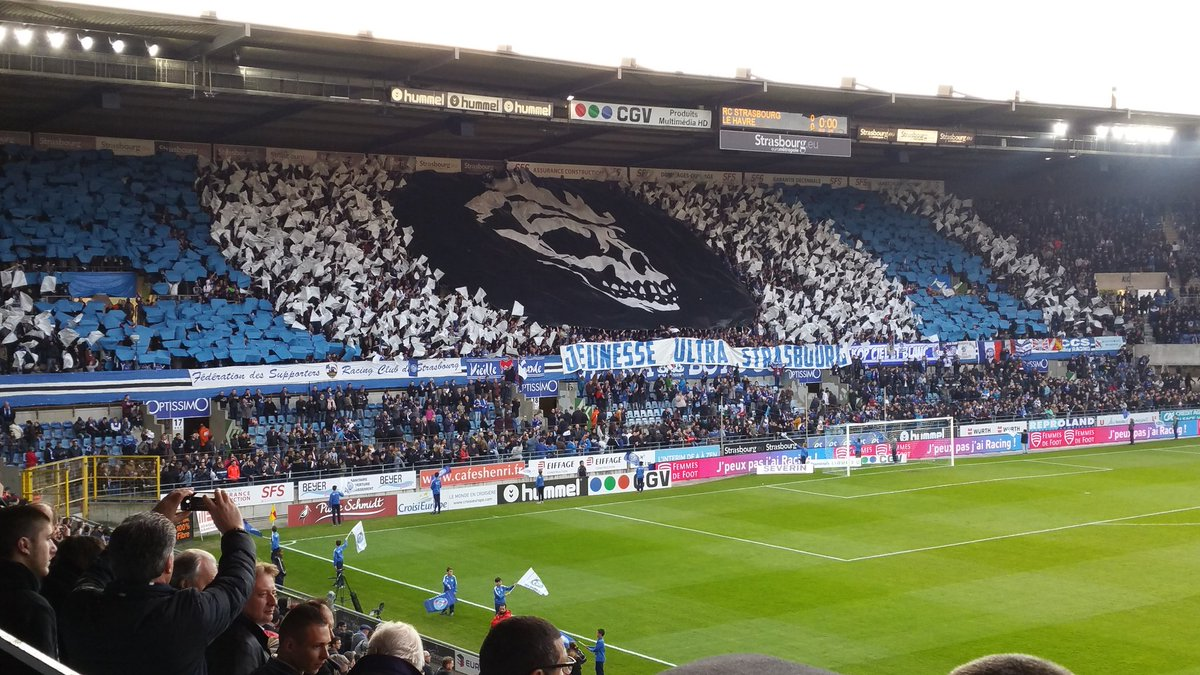 tifo des supporters du kop Racing Strasbourg RCSA-HAC